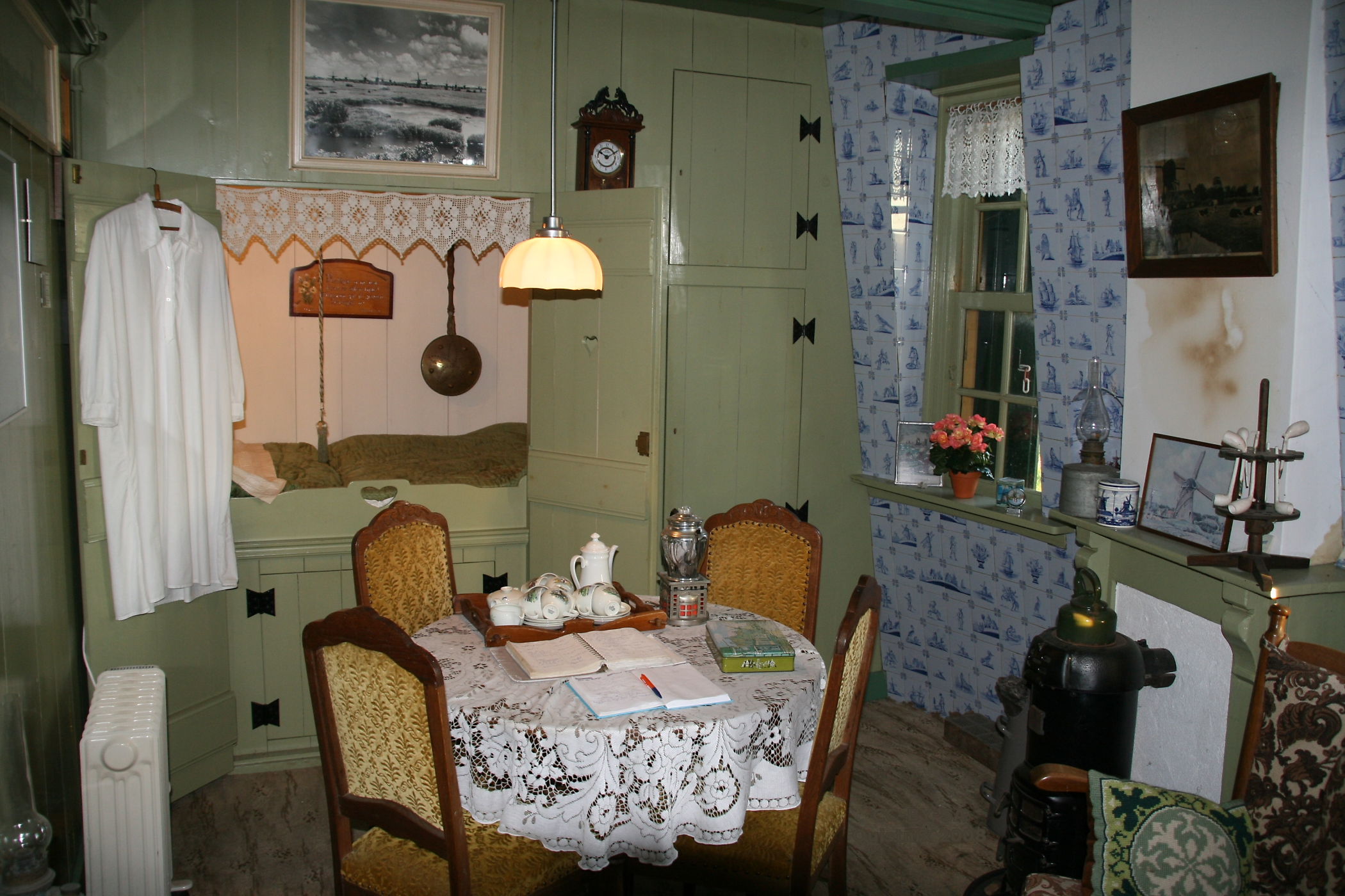 Schipluiden: Groeneveldse Molen, molenaarswoning. Bedstede, kast, potkachel.